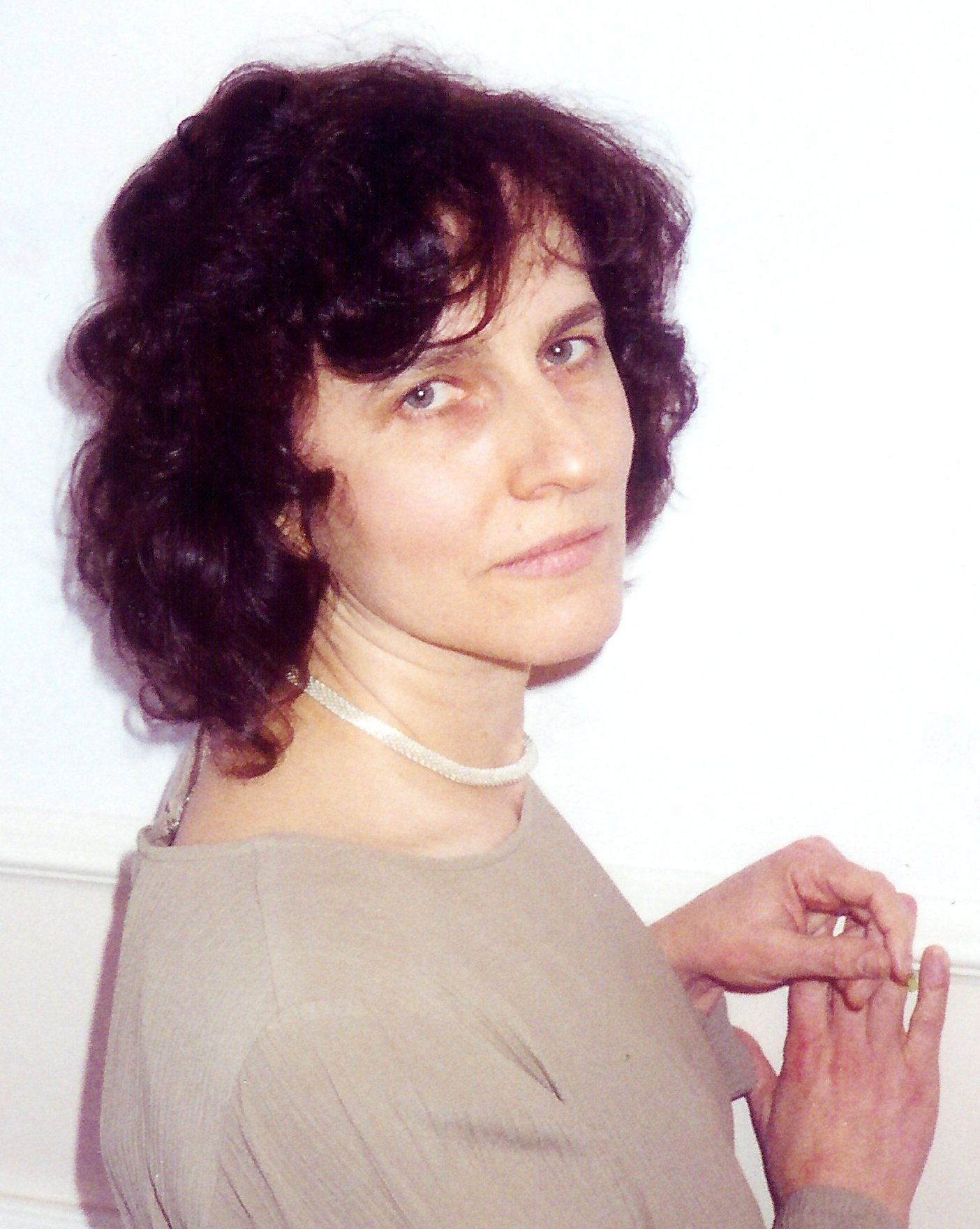 File:Elena Firsova 2000 ©Kompozitor.jpg